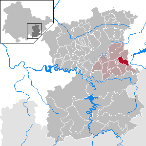 Göschitz in Thuringia - Saale-Orla-Kreis